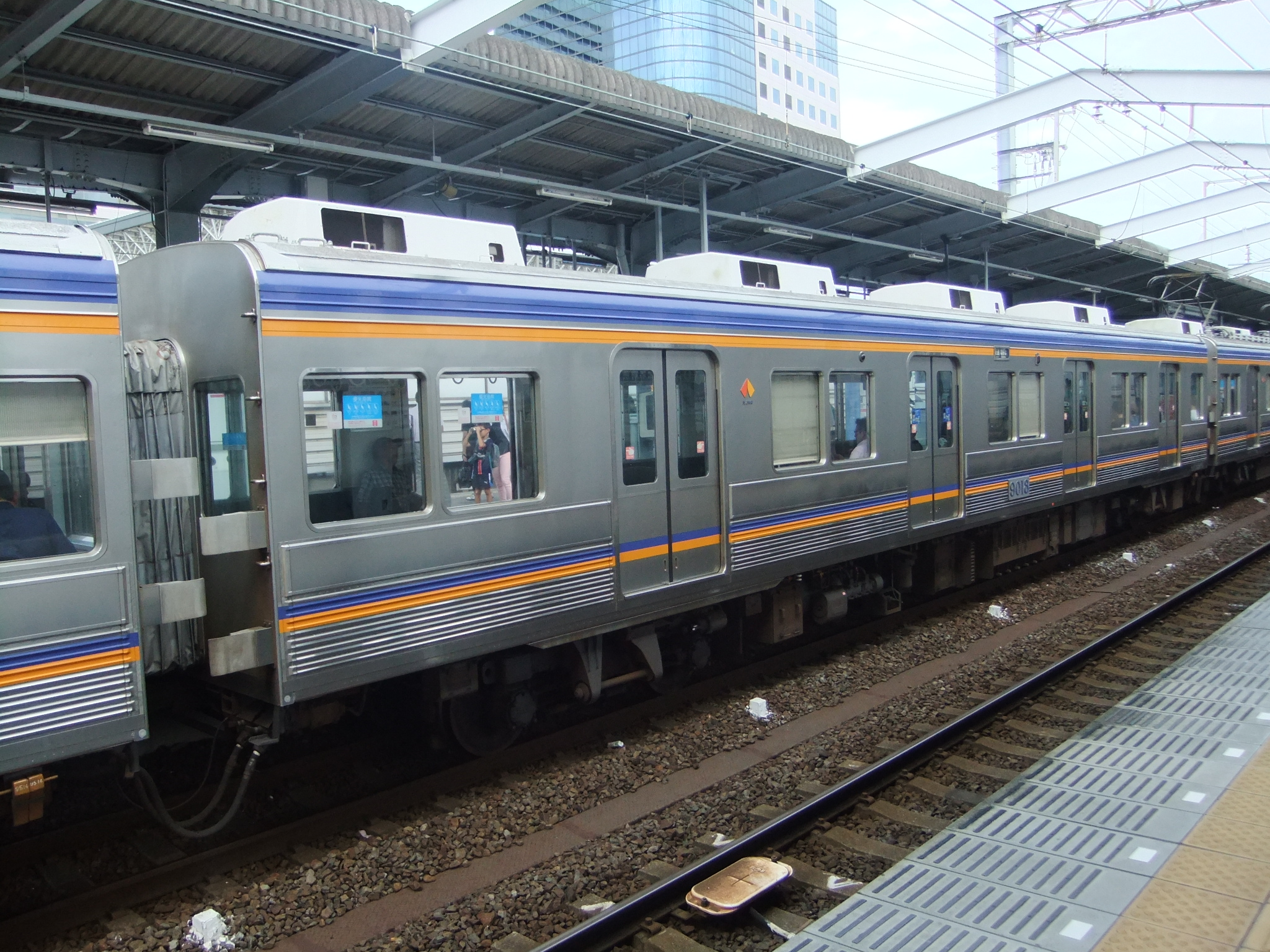 南海9000系 9018 堺駅